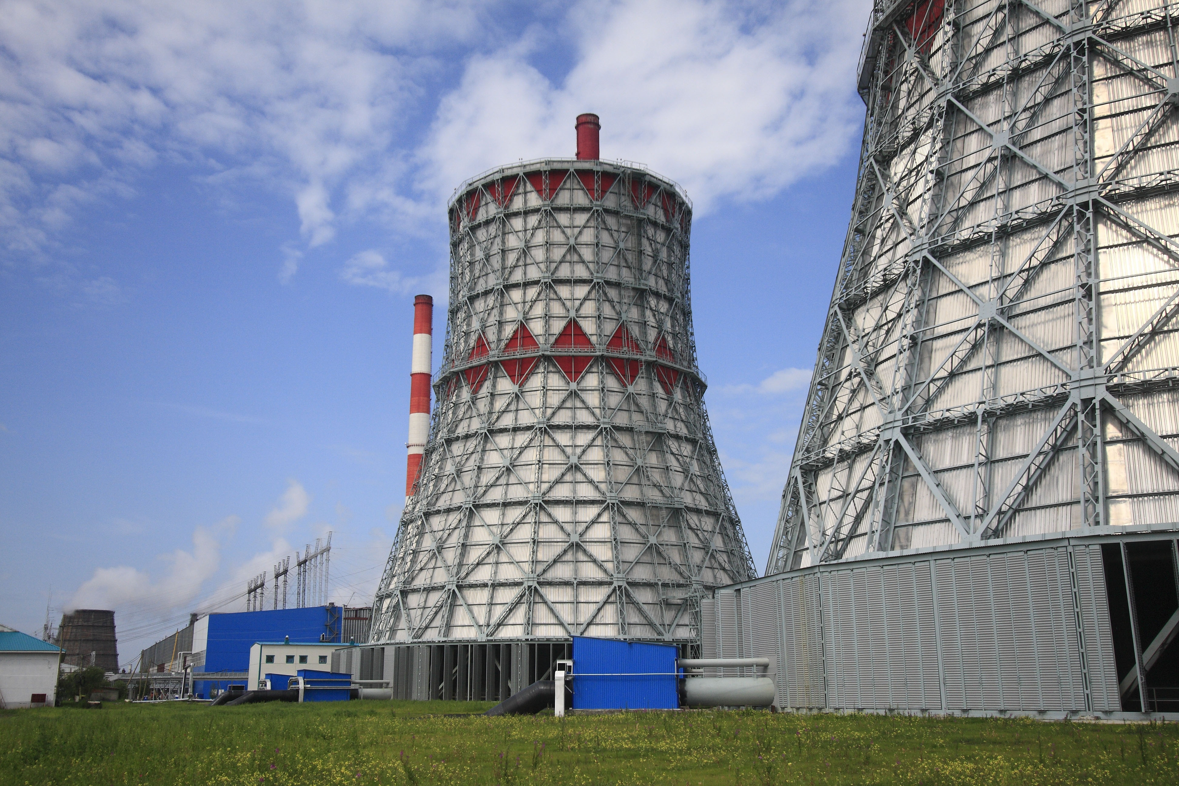 Тобольская ТЭЦ